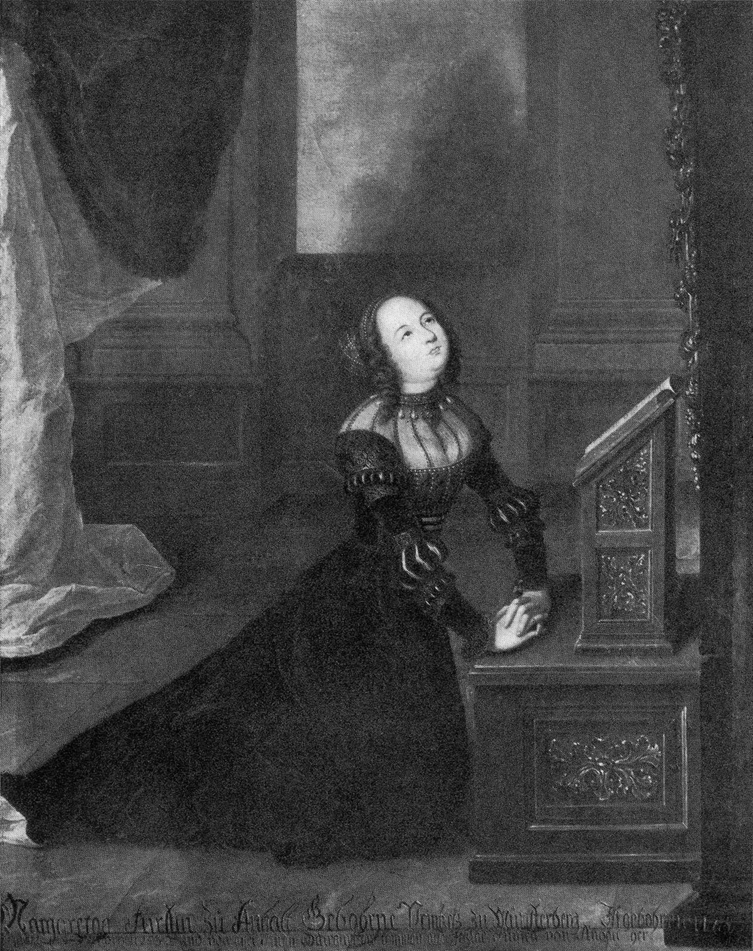 Christoph Friedrich Reinhold Lisiewski nach Lucas Cranach d.Ä., Margarethe Fürstin von Anhalt-Dessau (1473-1530) am Hausaltar kniend.